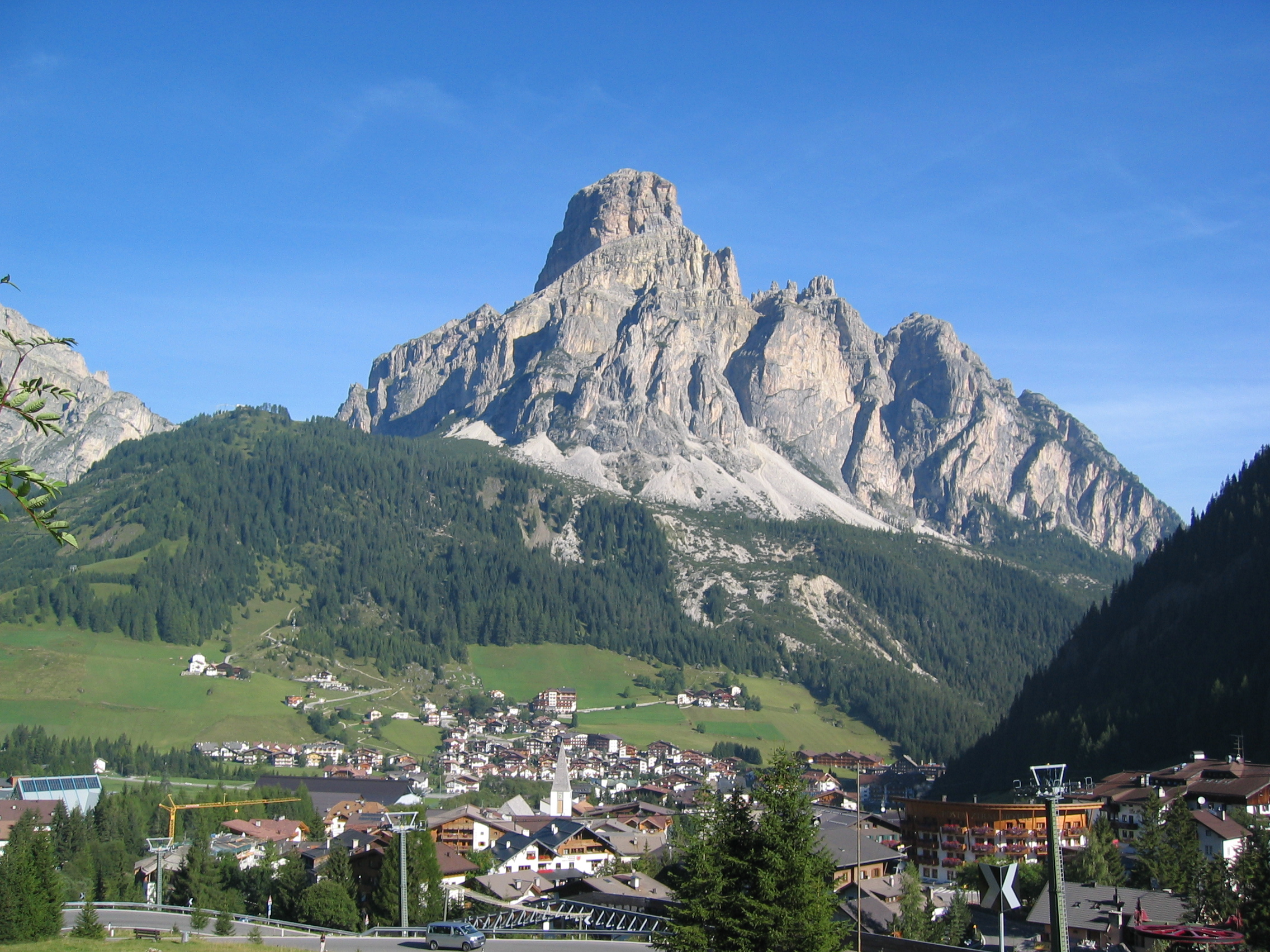 Corvara mit dem Sassongher.jpg